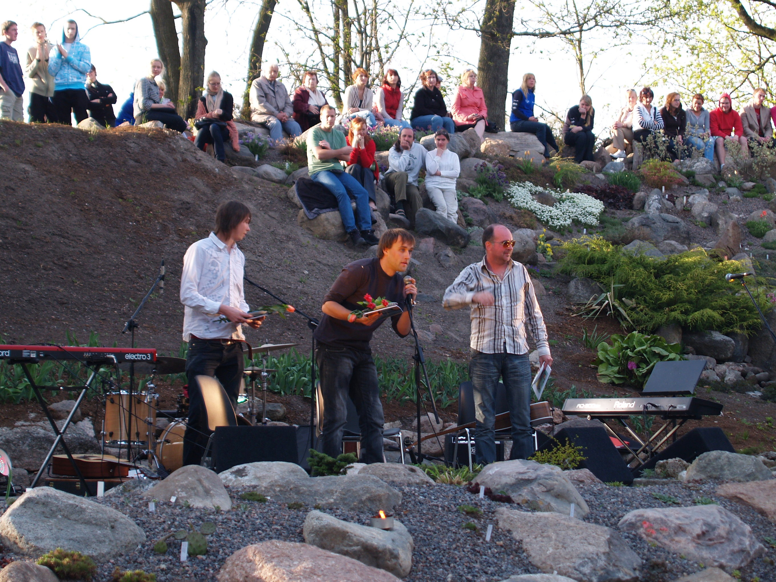 Tartu tudengite kevadpäevad 2009. Võluaia heategevuskontsert Tartu Ülikooli botaanikaaias. Mikk Saar.